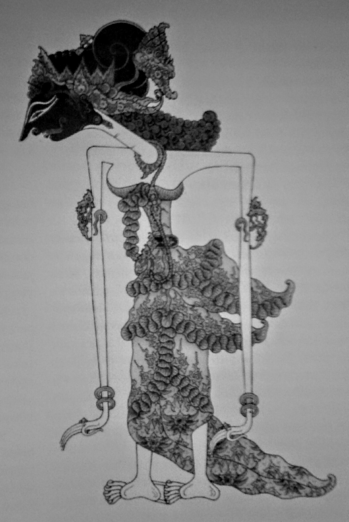 Jawa: Dèwi Sukèsi putri ingkang ayu pasuryanipun